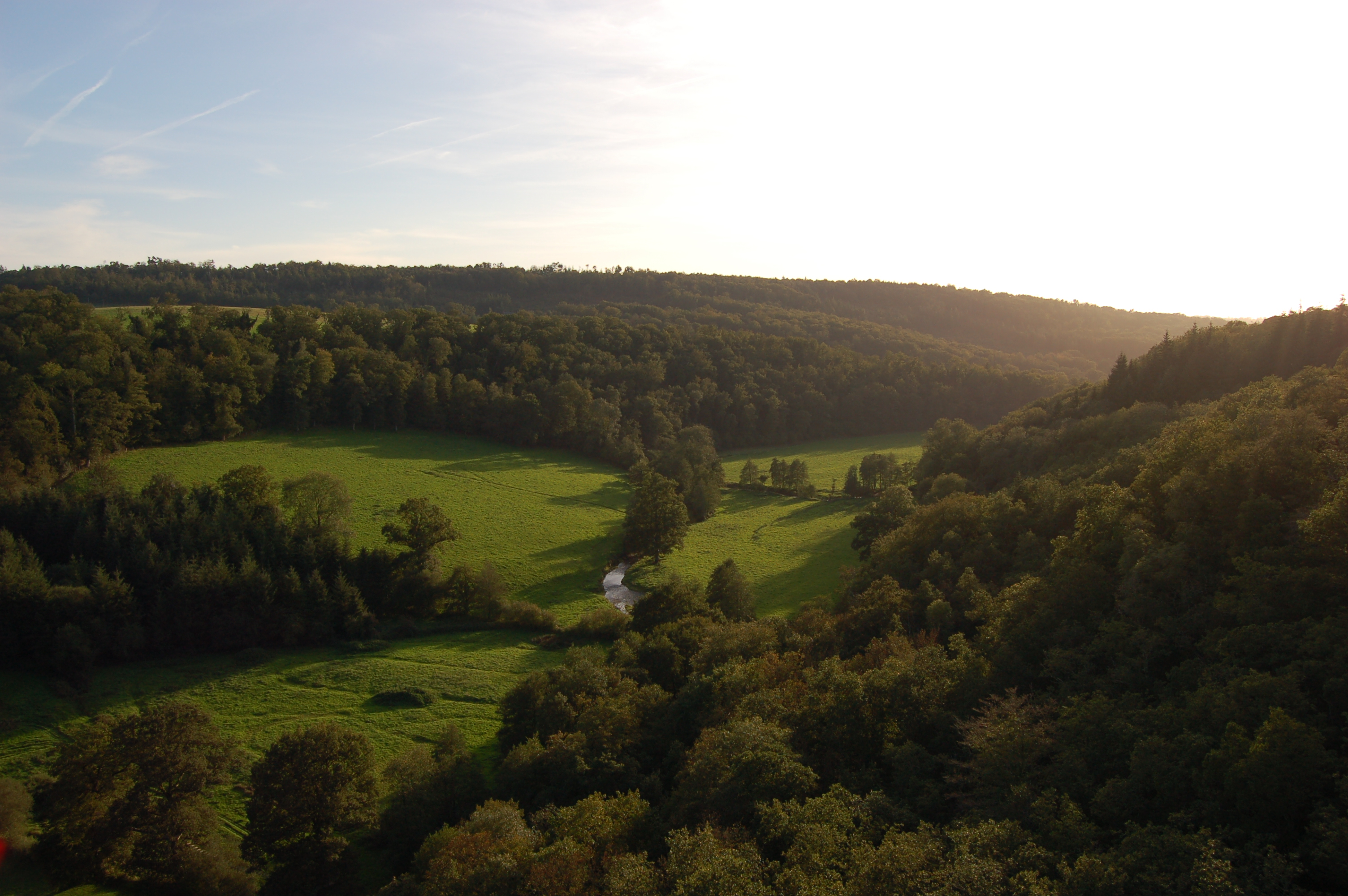 Vallée de la Souleuvre